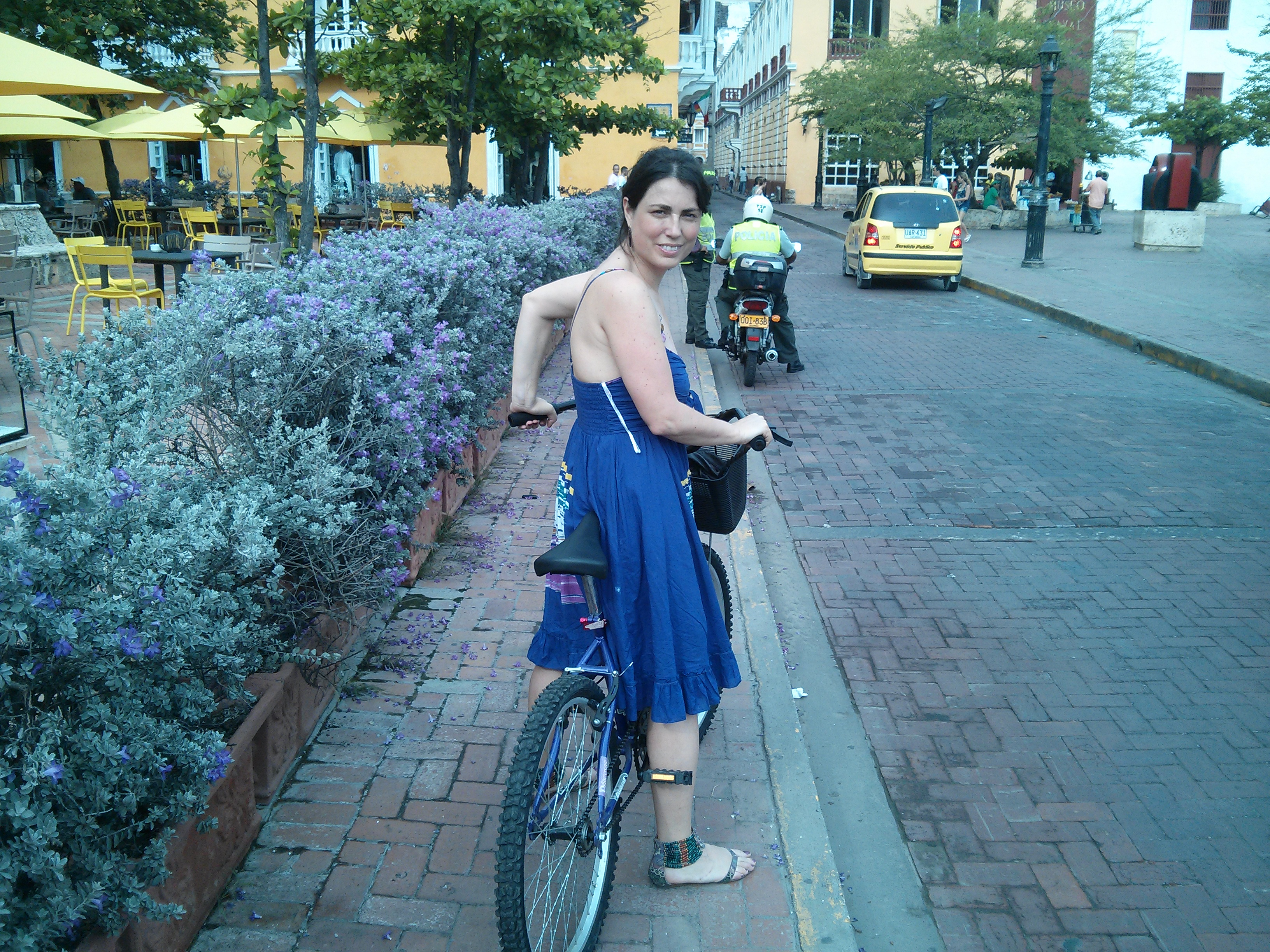 Rocío en su visita a Cartagena de Indias (2013) como invitada para el Seminario Internacional: Instersticios del pensar. Re-encuentros dialógicos entre la Filosofía y la Historia.